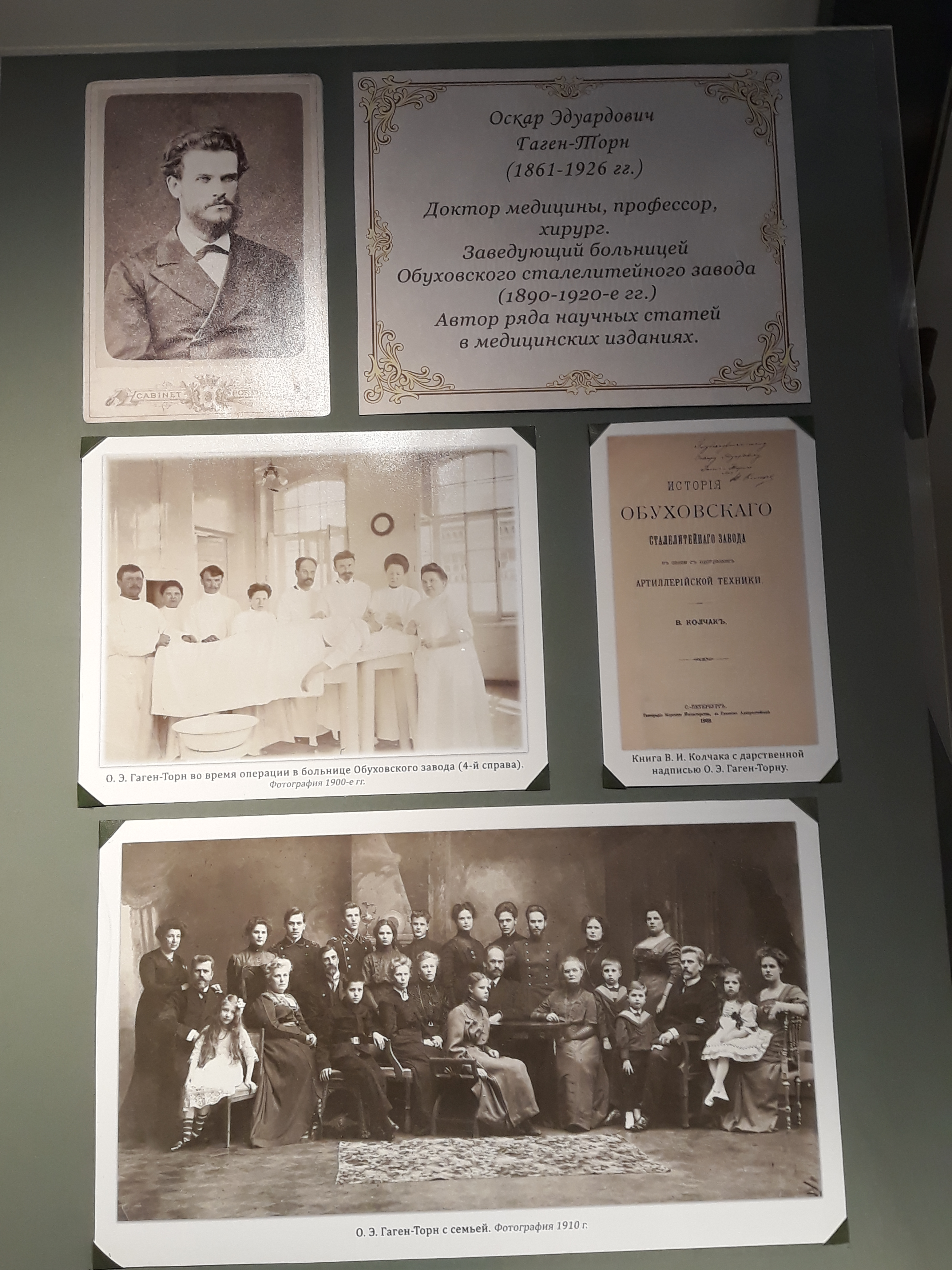 Музей Обуховского завода. Гаген-Торн Оскар Эдуардович (1861-1926). Заведующий Обуховской больницей (1890-1920-е г.). Доктор медицины, профессор, хирург. Автор ряда научных статей в медицинских изданиях